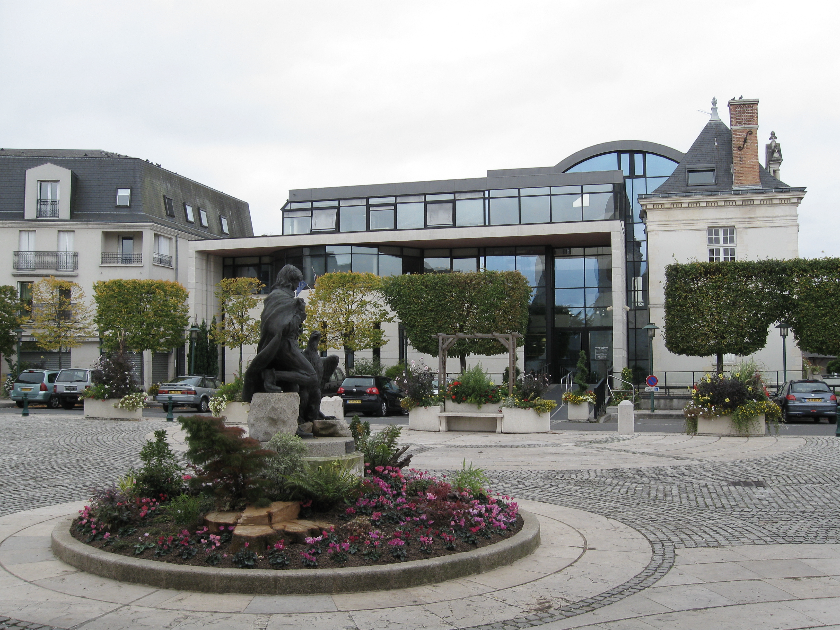 Hôtel de Ville, Saint-Jean-le-Blanc, Loiret, France